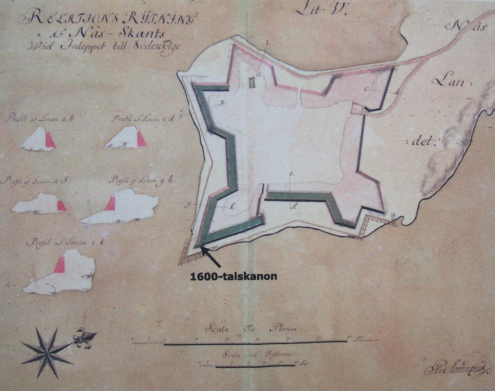 Relations Rytning af Näs-Skants wid Inloppet till Södertelge